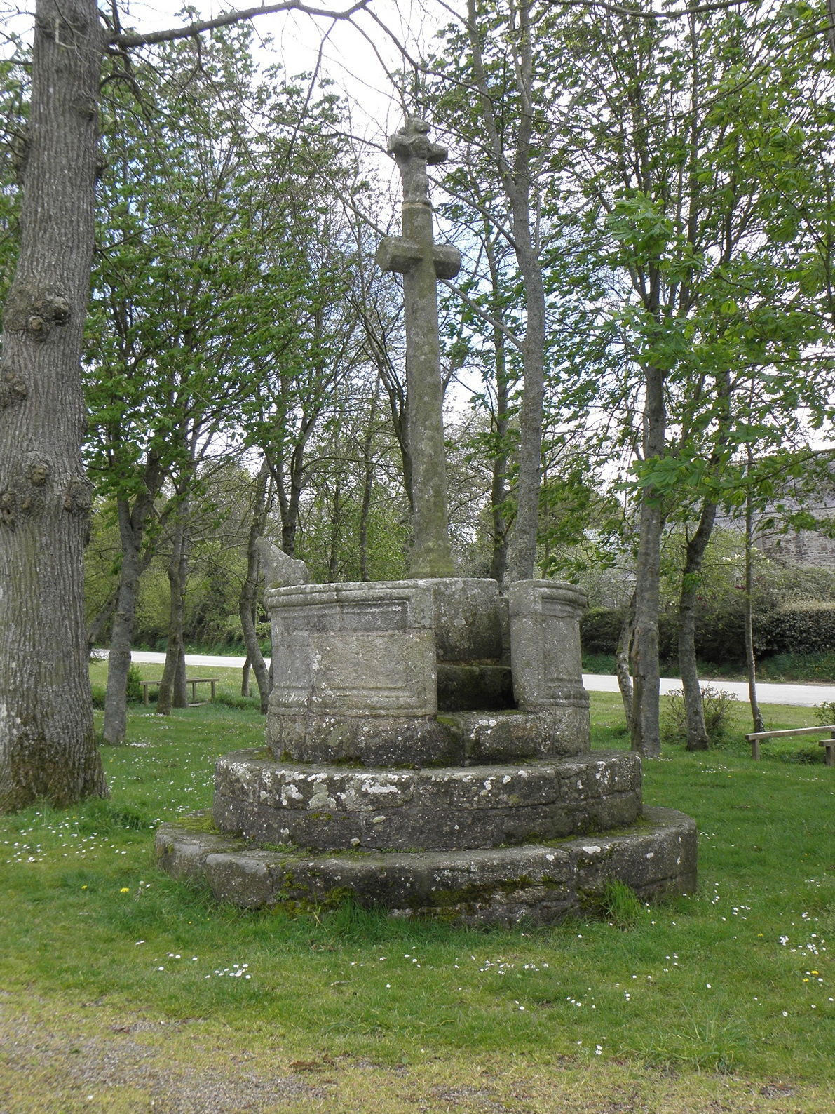 Chaire et calvaire de la chapelle Notre-Dame-de-Kérinec en Poullan-sur-Mer (29).